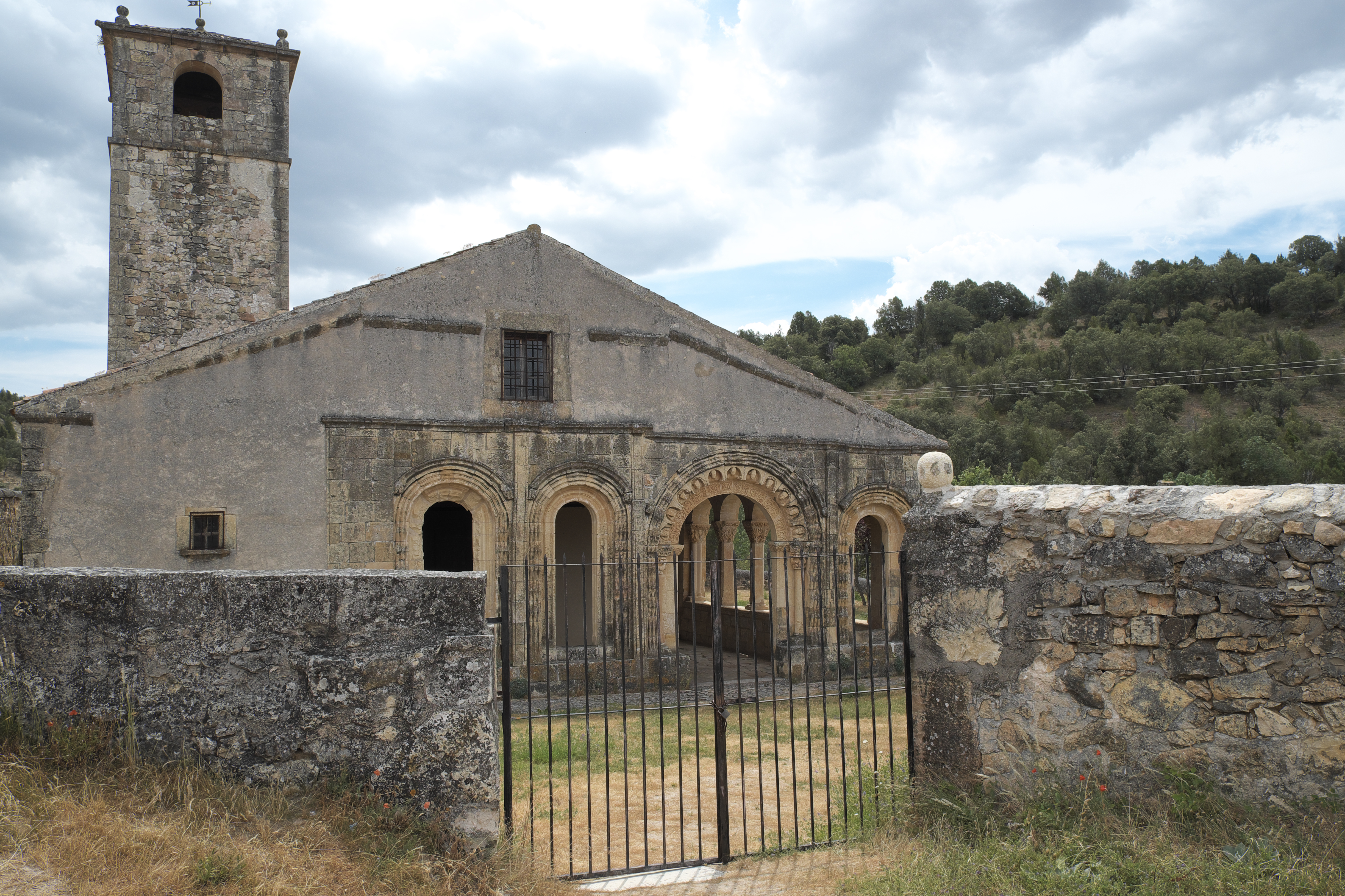 Katholische Kirche San Juan Bautista in Revilla de Orejana (Orejana) in der Provinz Segovia (Kastilien und León/Spanien)